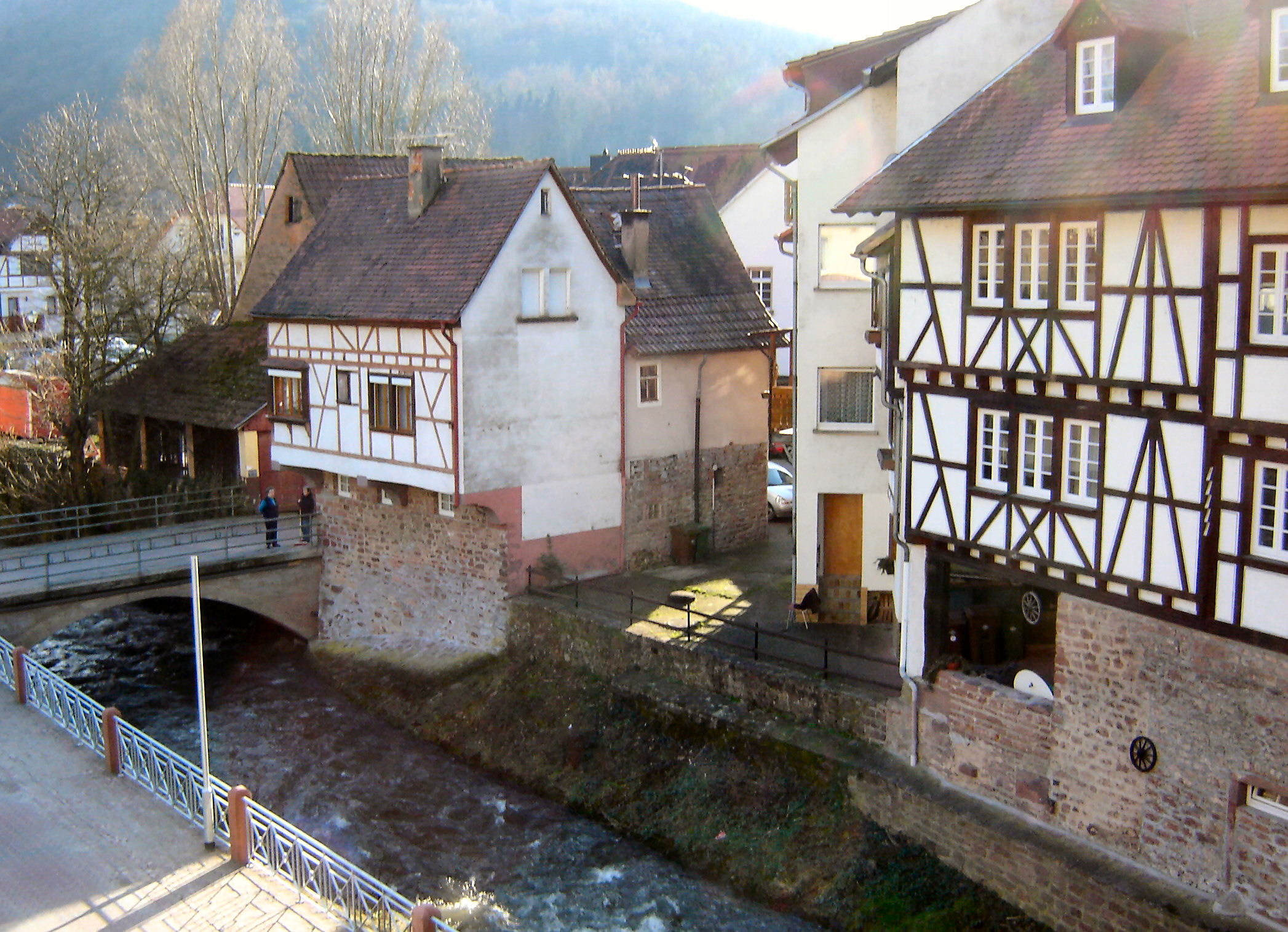 In der Altstadt von Neckarsteinach